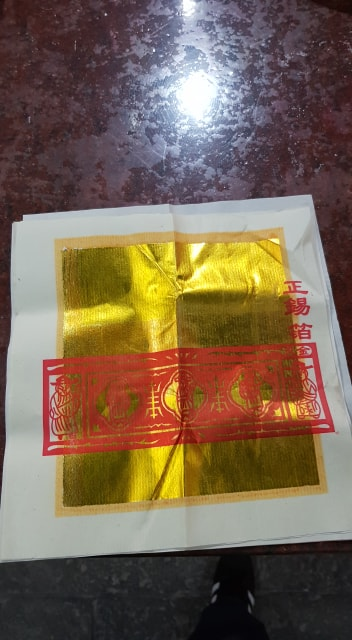 新竹地區流行的紙錢，天金